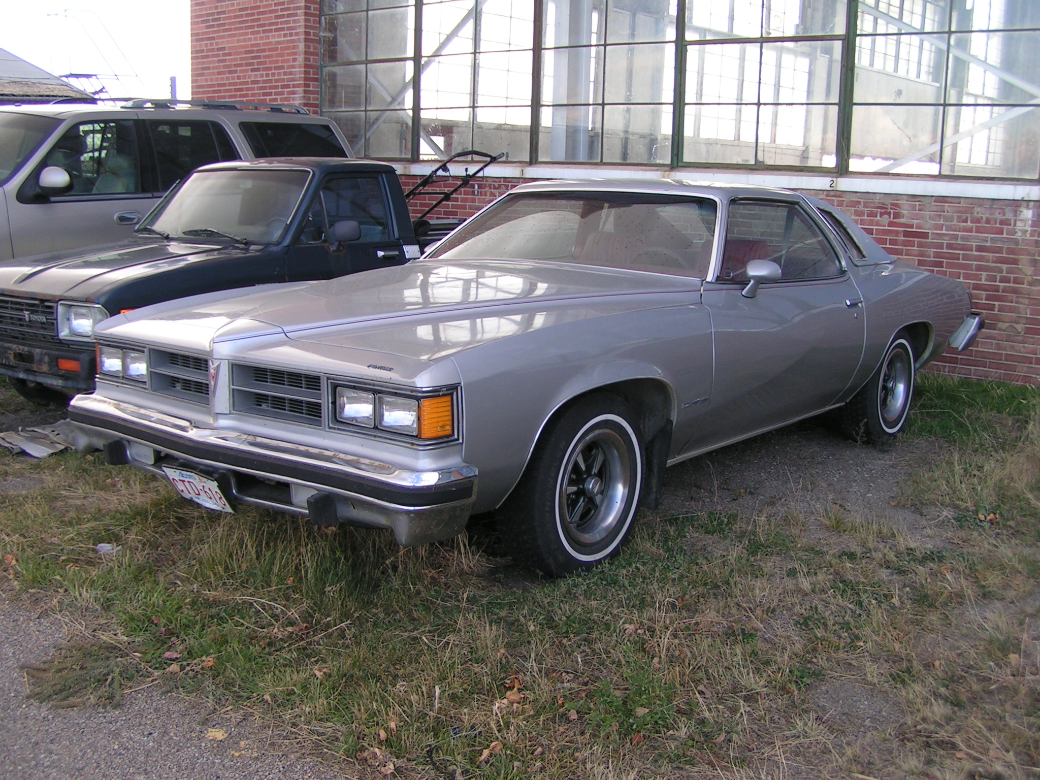 Pontiac